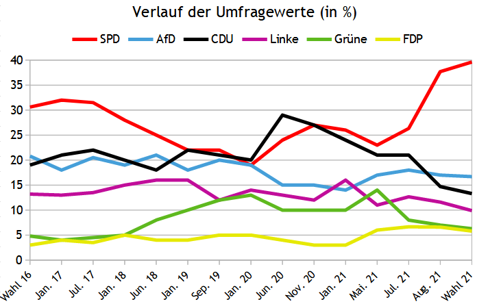 Umfragen zur Landtagswahl Mecklenburg-Vorpommern